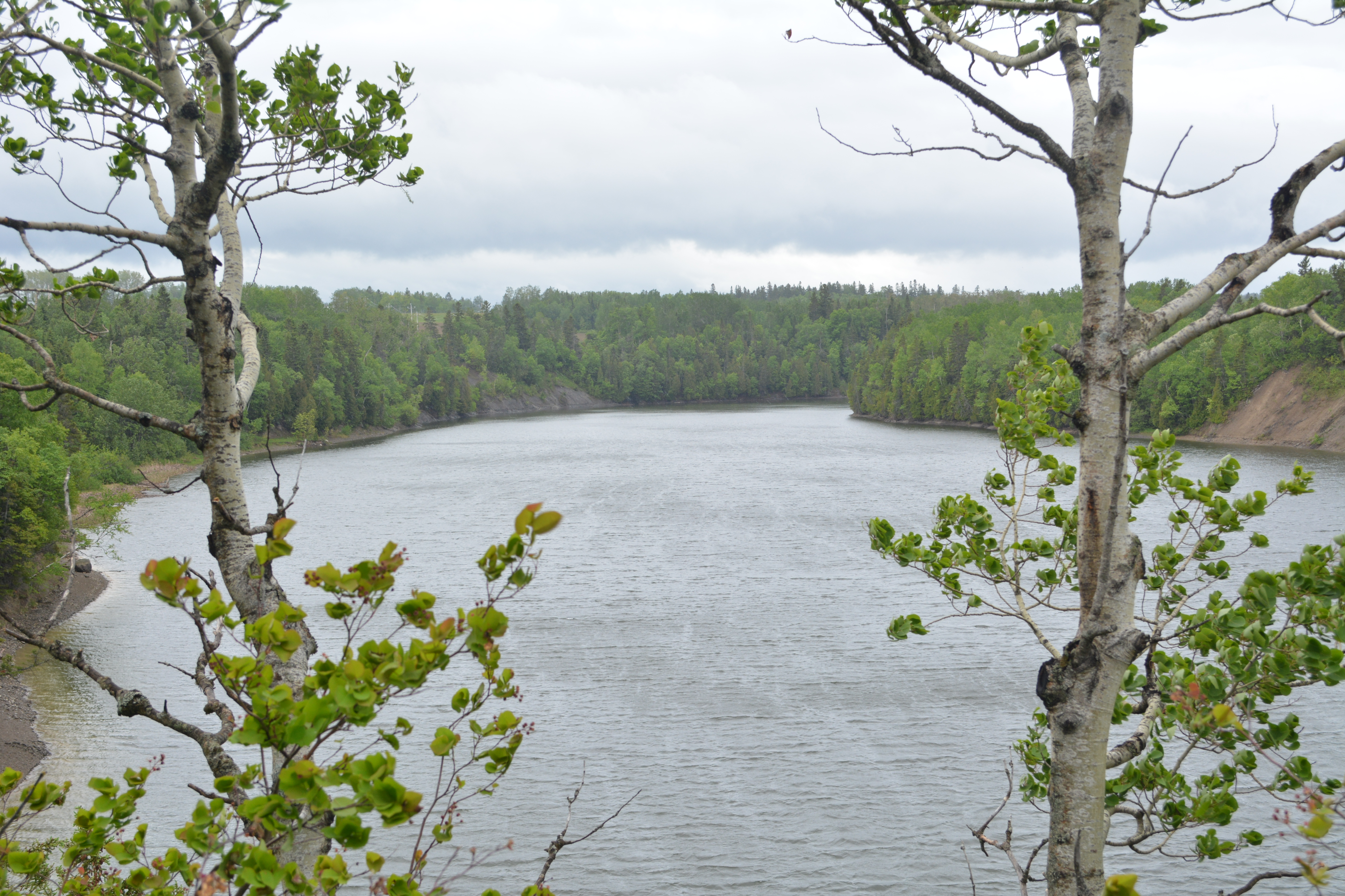 Rivière Mitis vue à partir du belvédère sur le sentier Mitiwee près de Grand-Métis